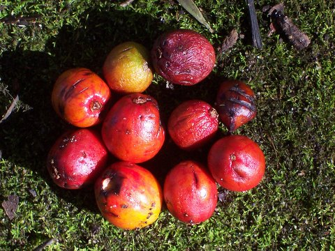 Cryptocarya laevigata fruit